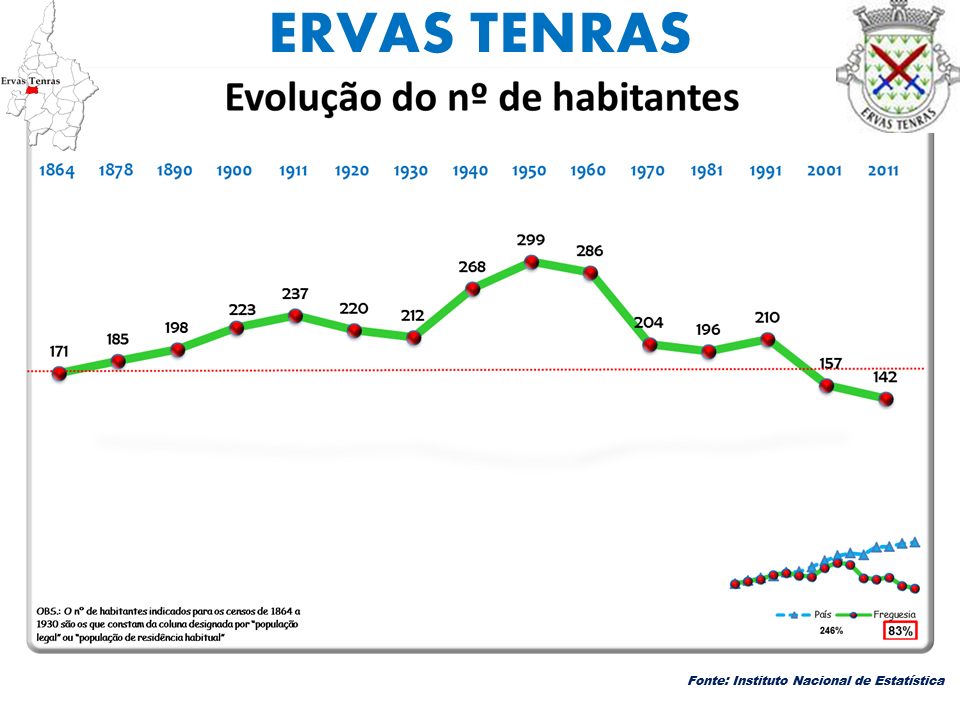 Censos 1864/2011